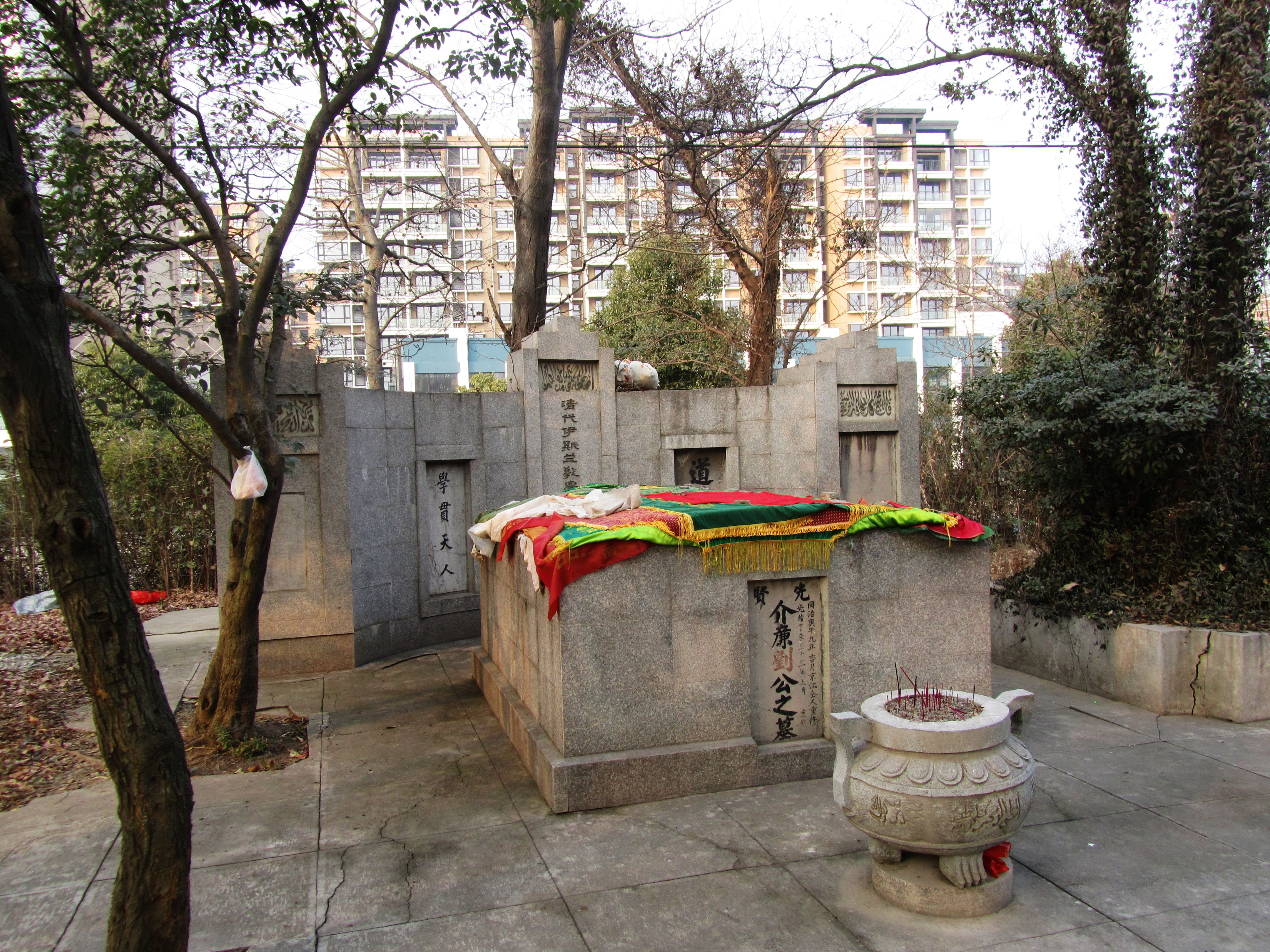 南京雨花台区刘智墓。